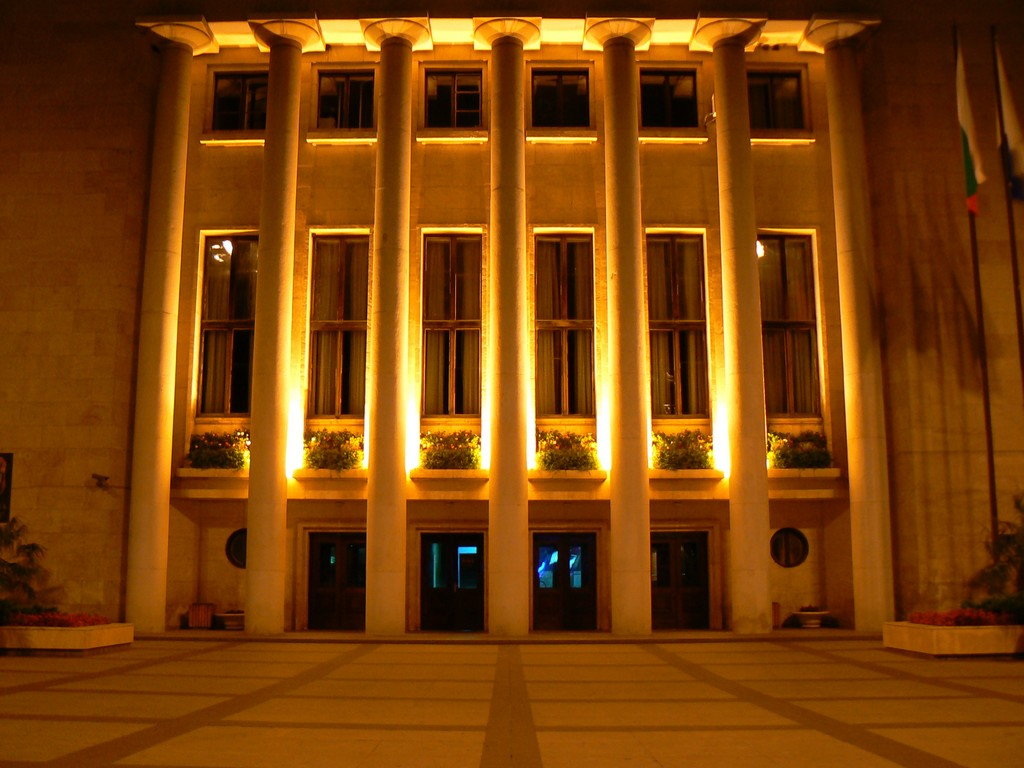 Сградата на община Бургас